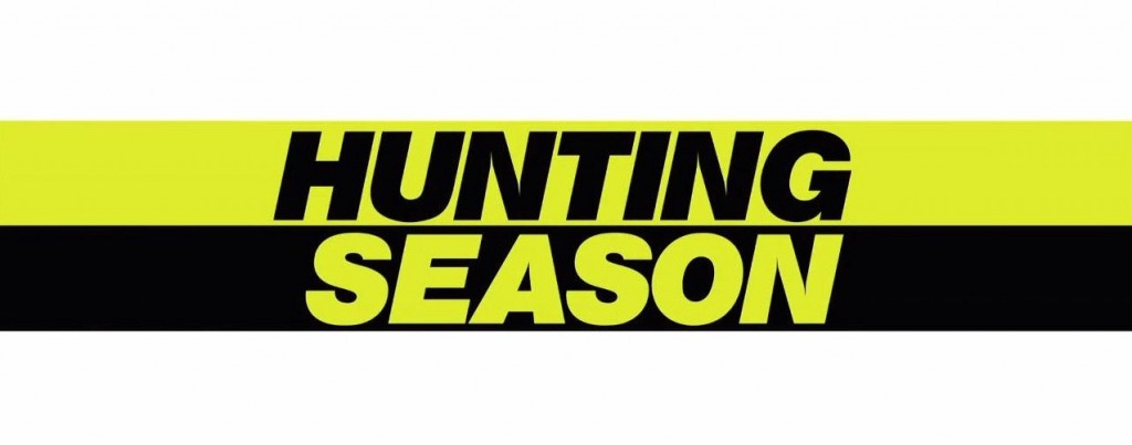 Logo de abertura